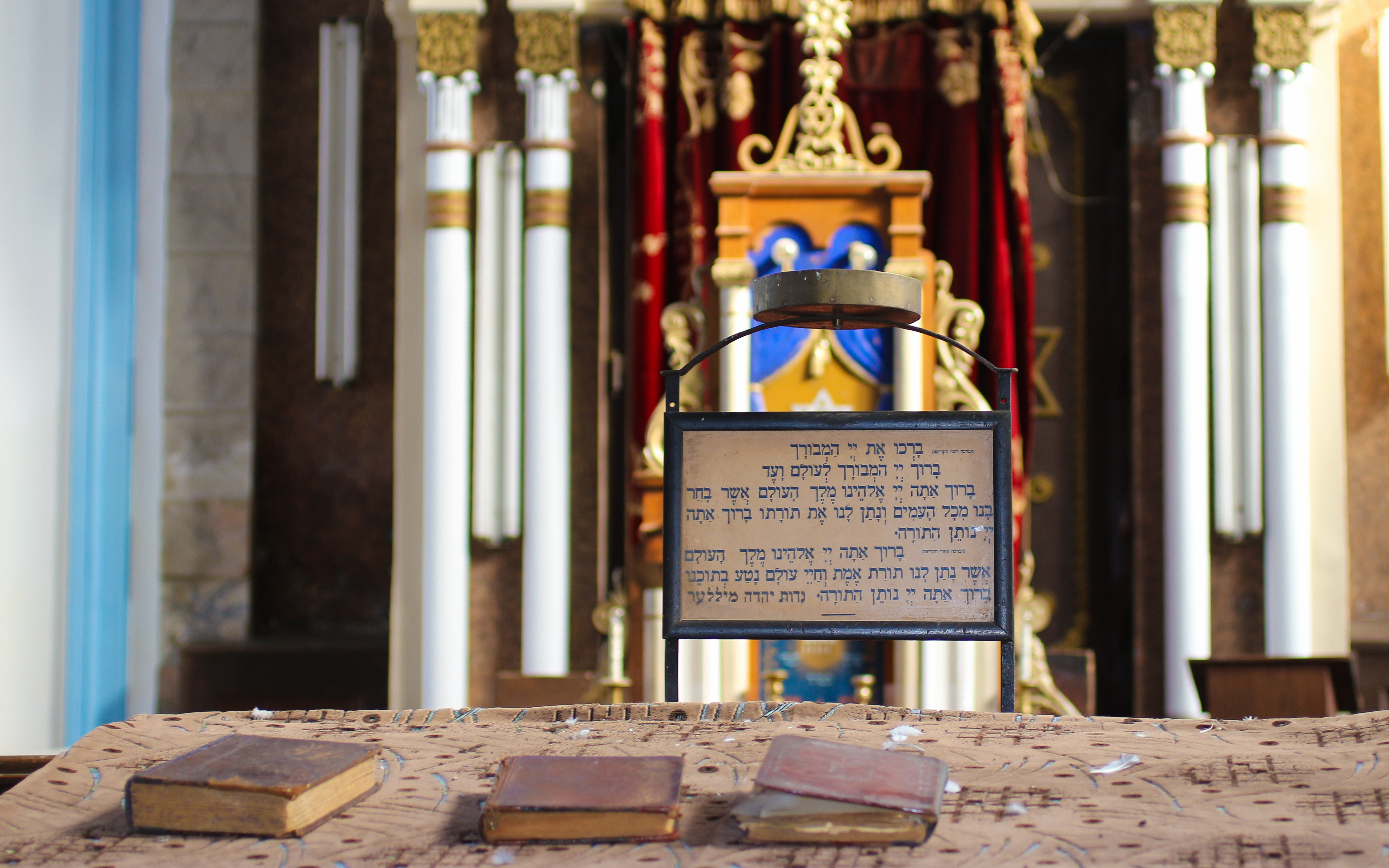 interior templu